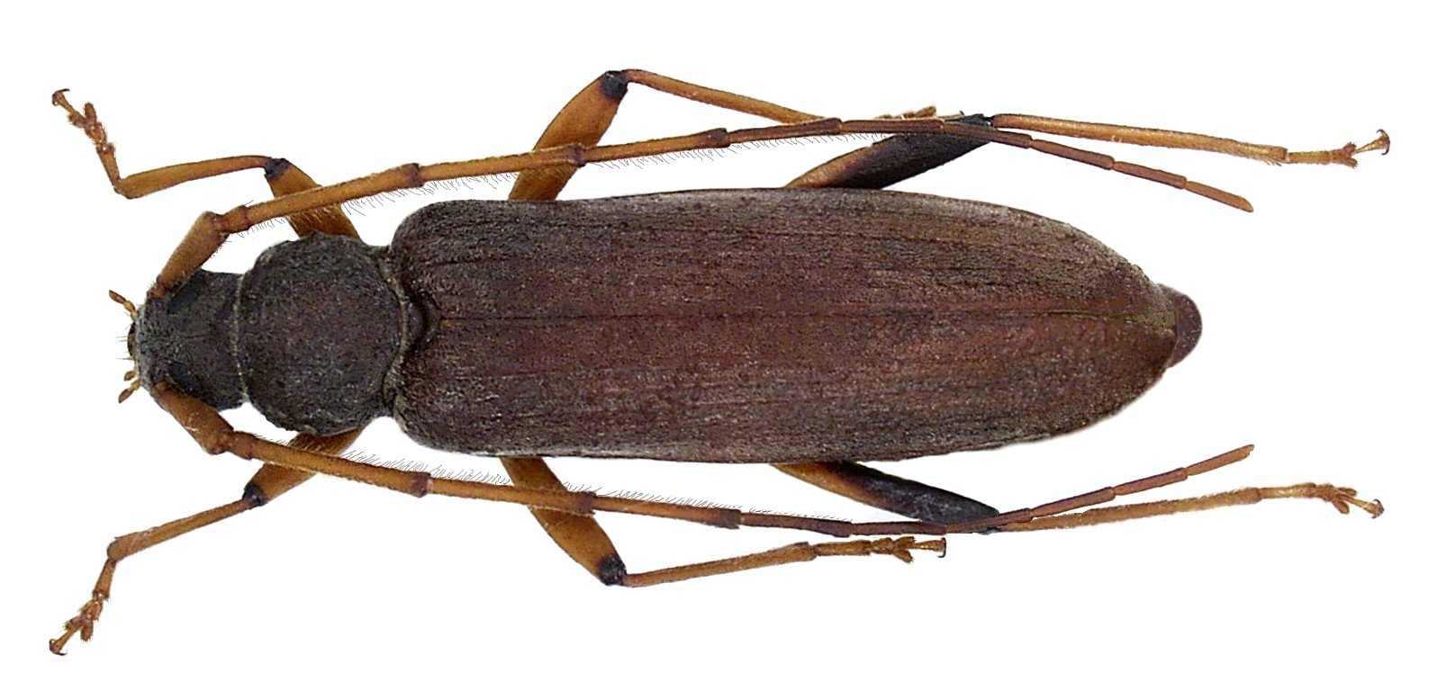 Familie: Cerambycidae Grösse: 21,5 mm Fundort: Malaysia, Borneo, Sabah leg. F. bin Eying, 2005; det. A.Weigel Foto: U.Schmidt, 2006